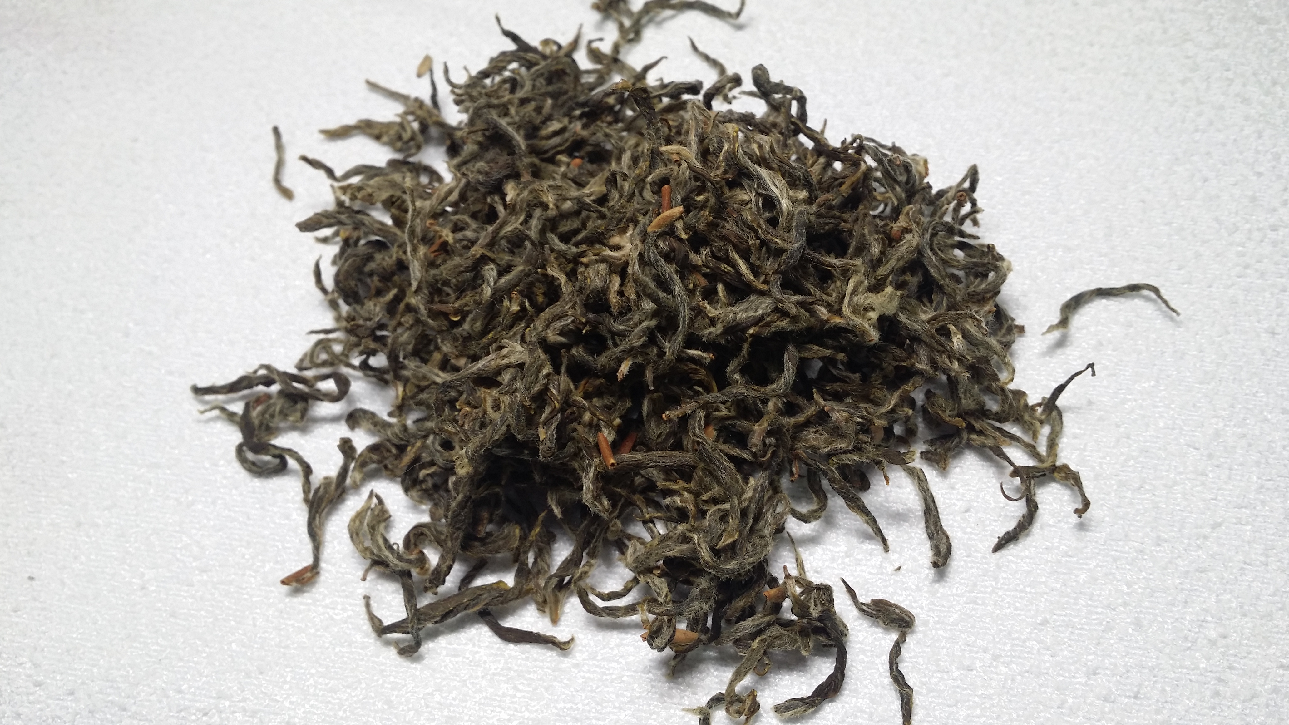 노각차는 노각나무의 어린잎을 채취해서 녹차의 제다법과 동일하게 만든차로 여러번 덖고 비비고를 반복하여 만든다.